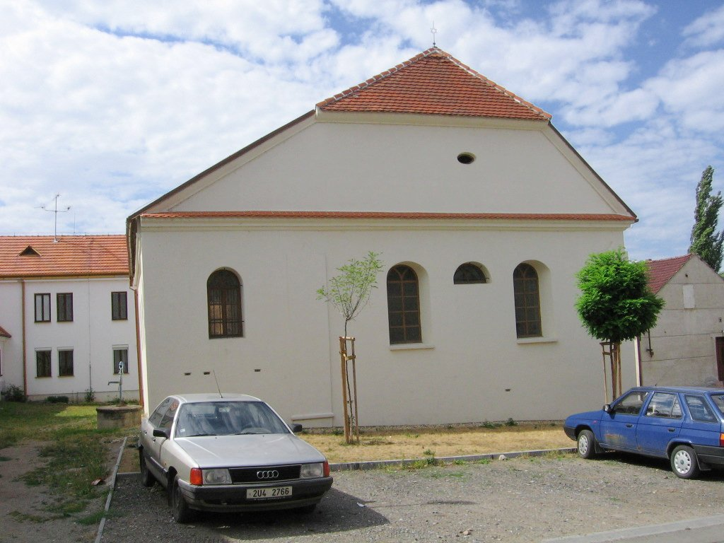 Východní strana synagogy v Dolních Kounicích. The synagogue in Dolní Kounice - view from east.